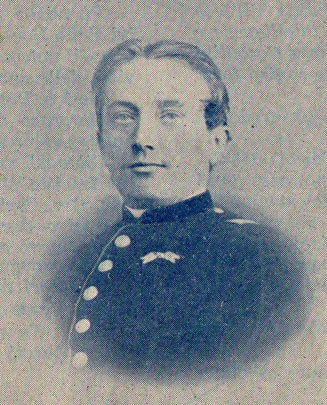 il capitano Vittorio Albertoletti nel 1861